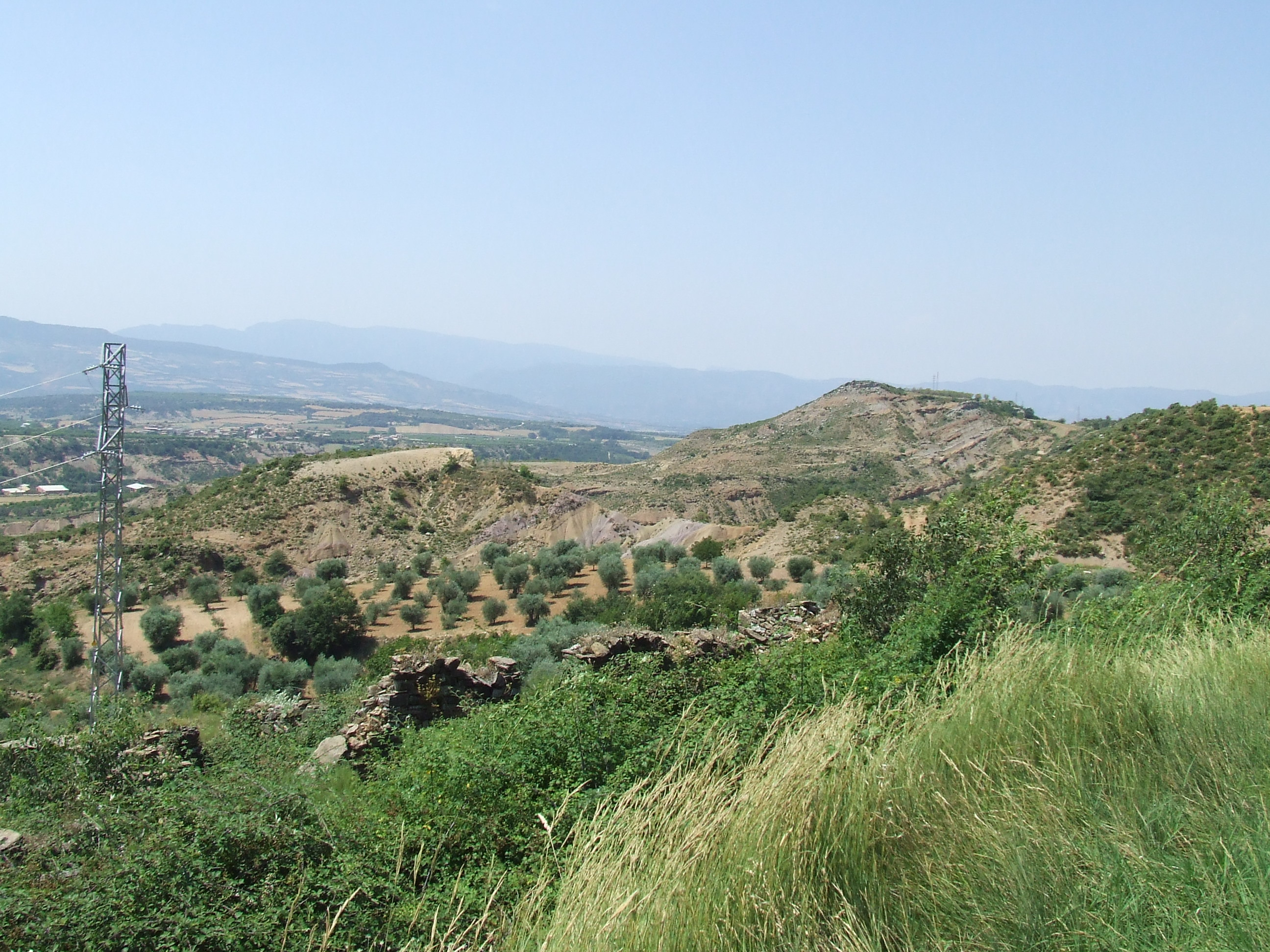 Cal Xinco Vell; al fons, el Tossal de la Doba (Abella de la Conca, Pallars Jussà)